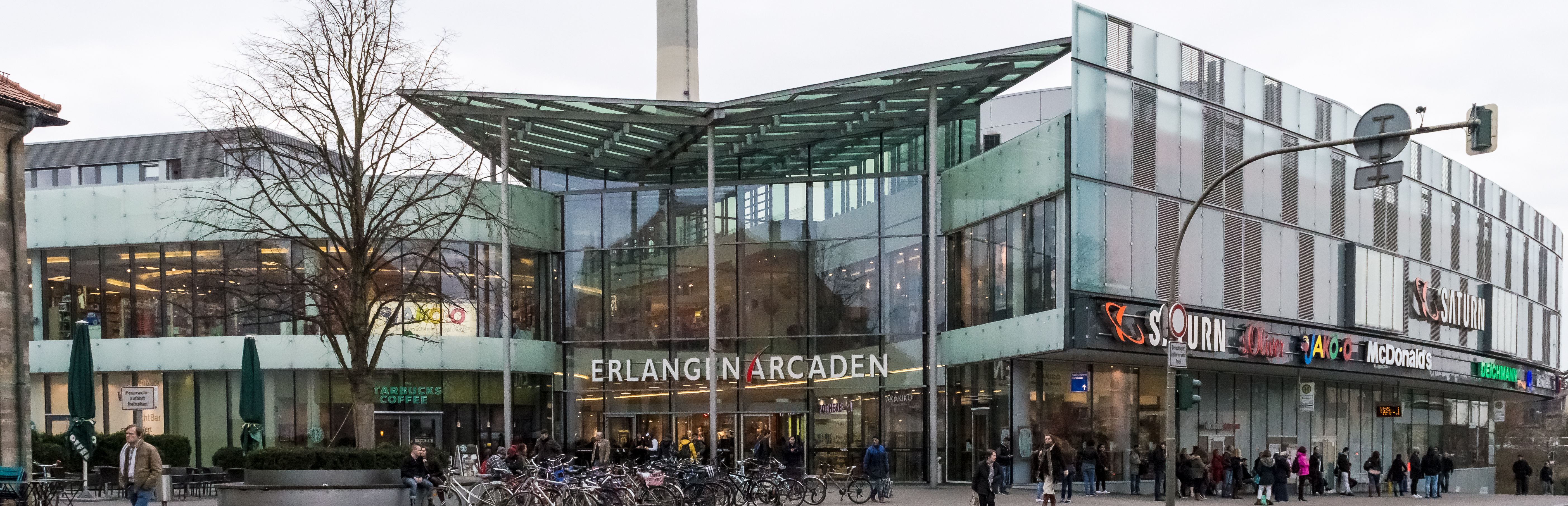 Erlanger Arcaden im März 2015